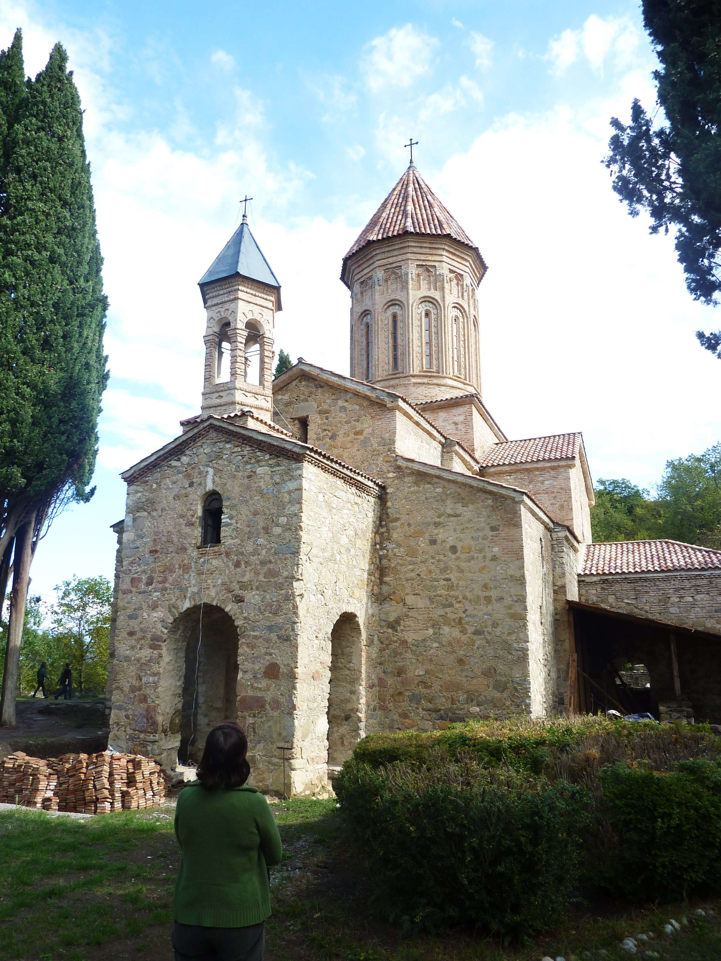 L'église du monastère d'Ikalto